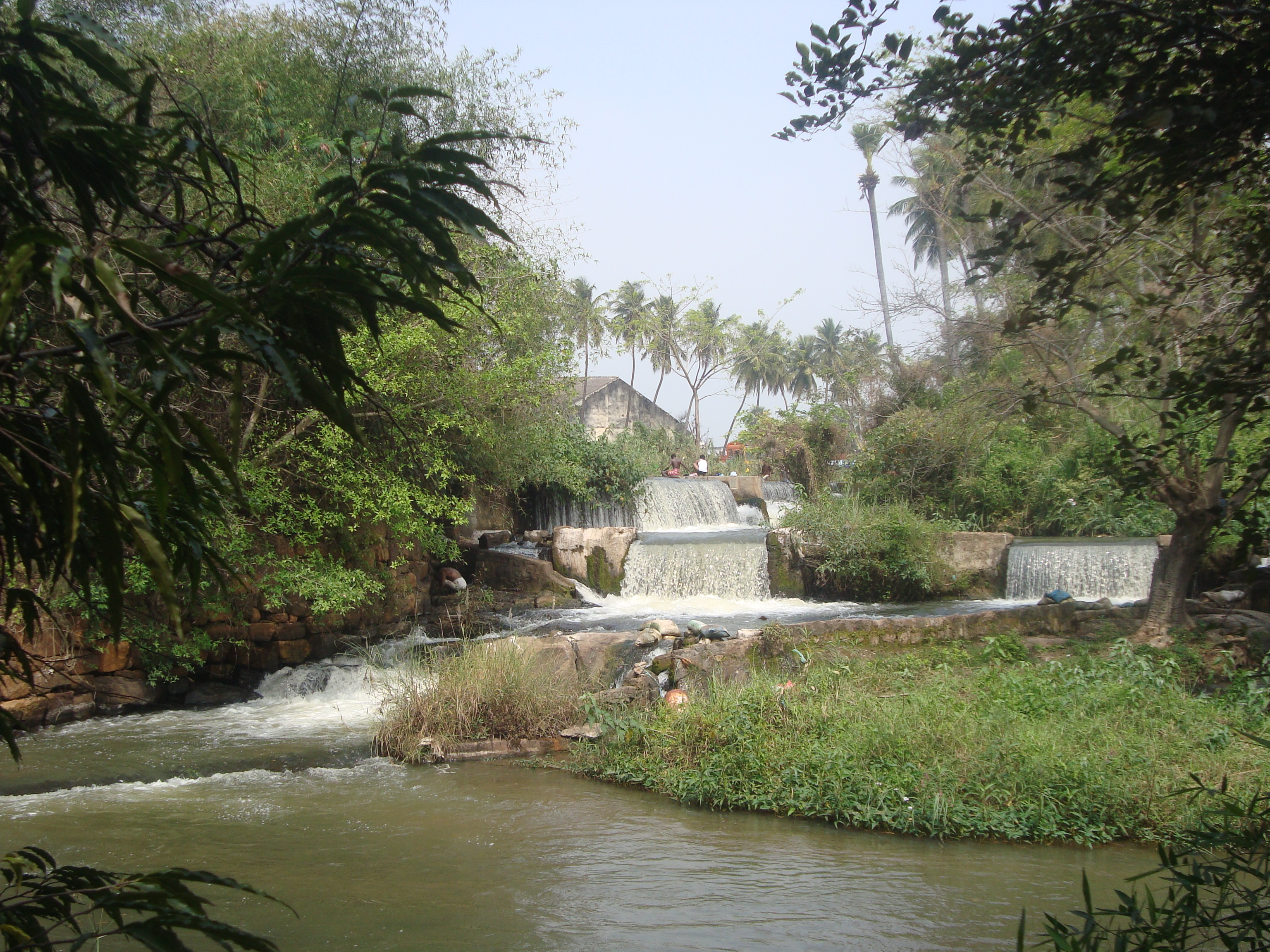 பழனிசெட்டிபட்டி மணல்வாரி நீர்ப்பிரிவுப் பகுதி Unknown